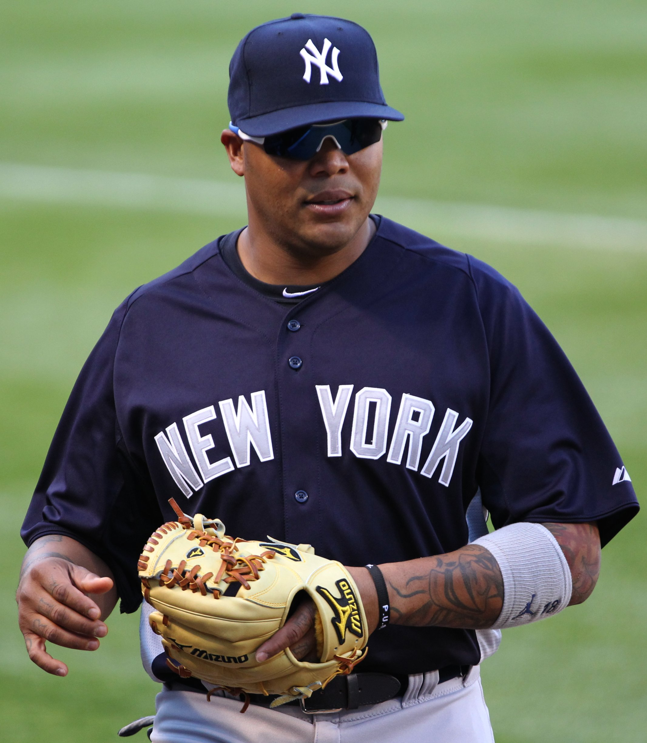 Andruw Jones